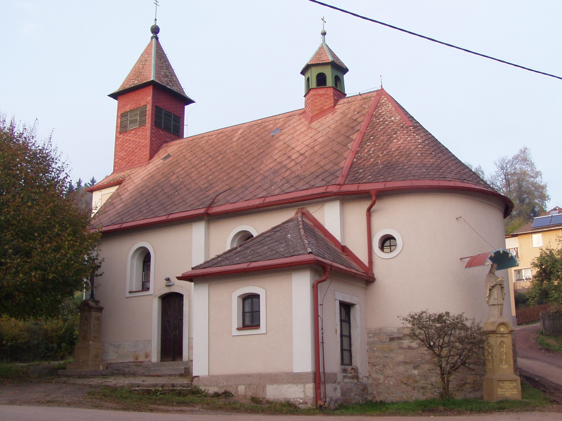 Kostel Nanebevzetí Panny Marie (Bohdašín)